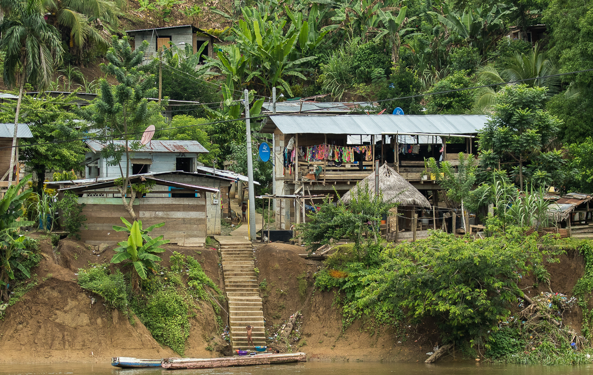 Village along Rio Chuqunaue - Darien - Panama CD5A1079